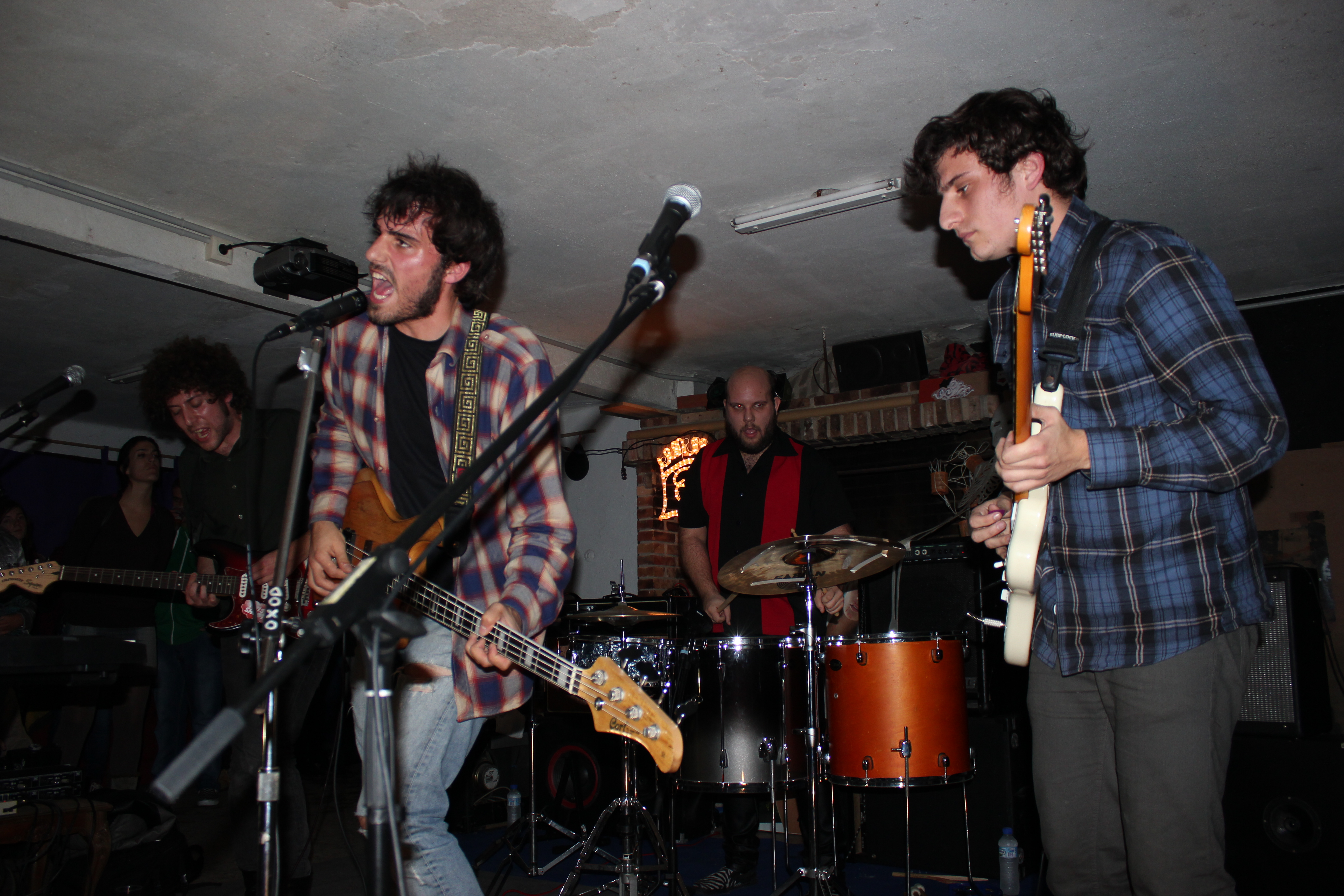 A banda galega Telephones Rouges no Liceo Mutante de Pontevedra.